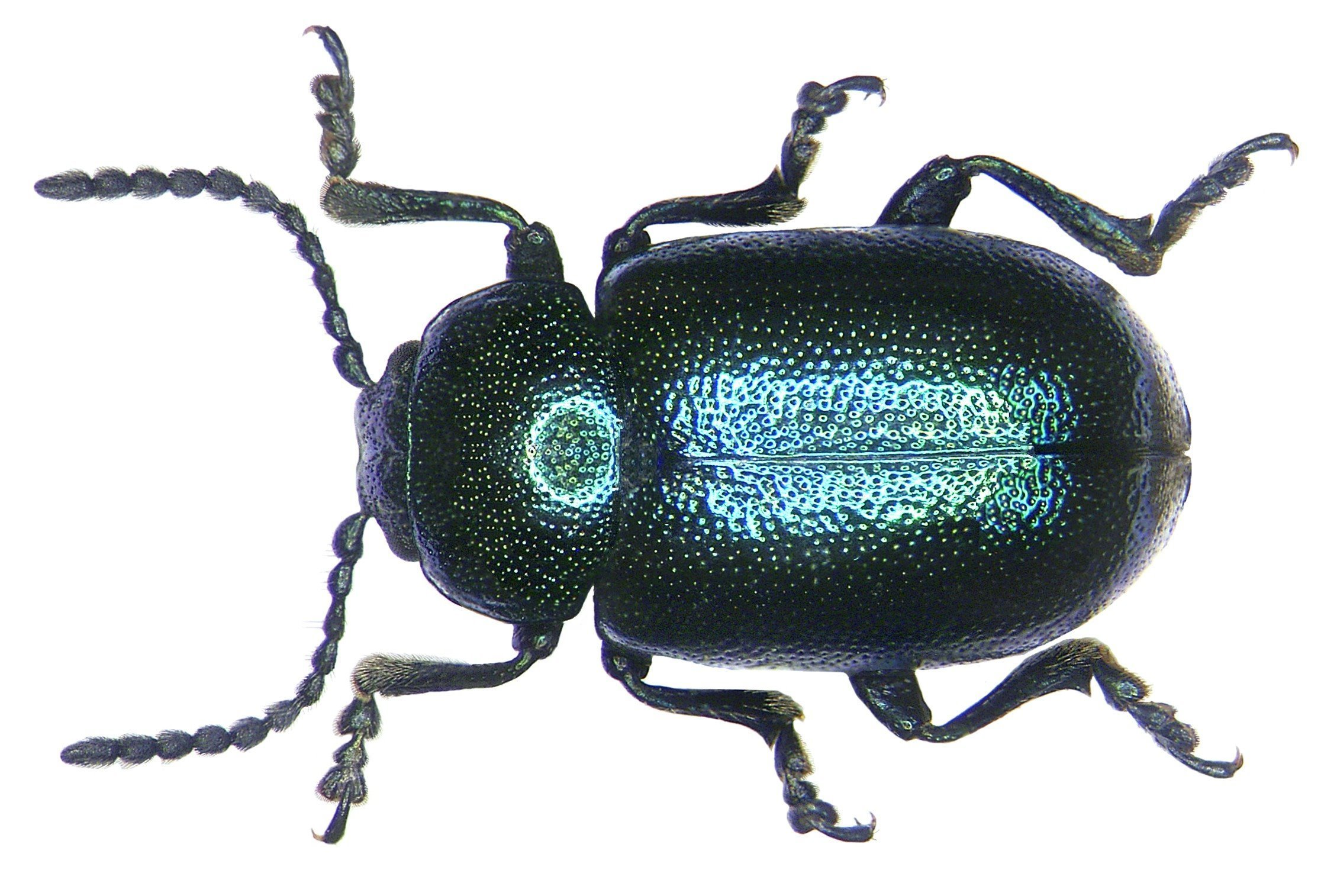 Gastrophysa viridula (DeGeer, 1775) Familie: Chrysomelidae Groesse: 4-6 mm Verbreitung: Europa Ökologie: an Rumex- und Polygonum-Arten Fundort: Germania, Bayern, Oberfranken, Selbitz leg.det. U.Schmidt, 1971 Photo: U.Schmidt, 2006